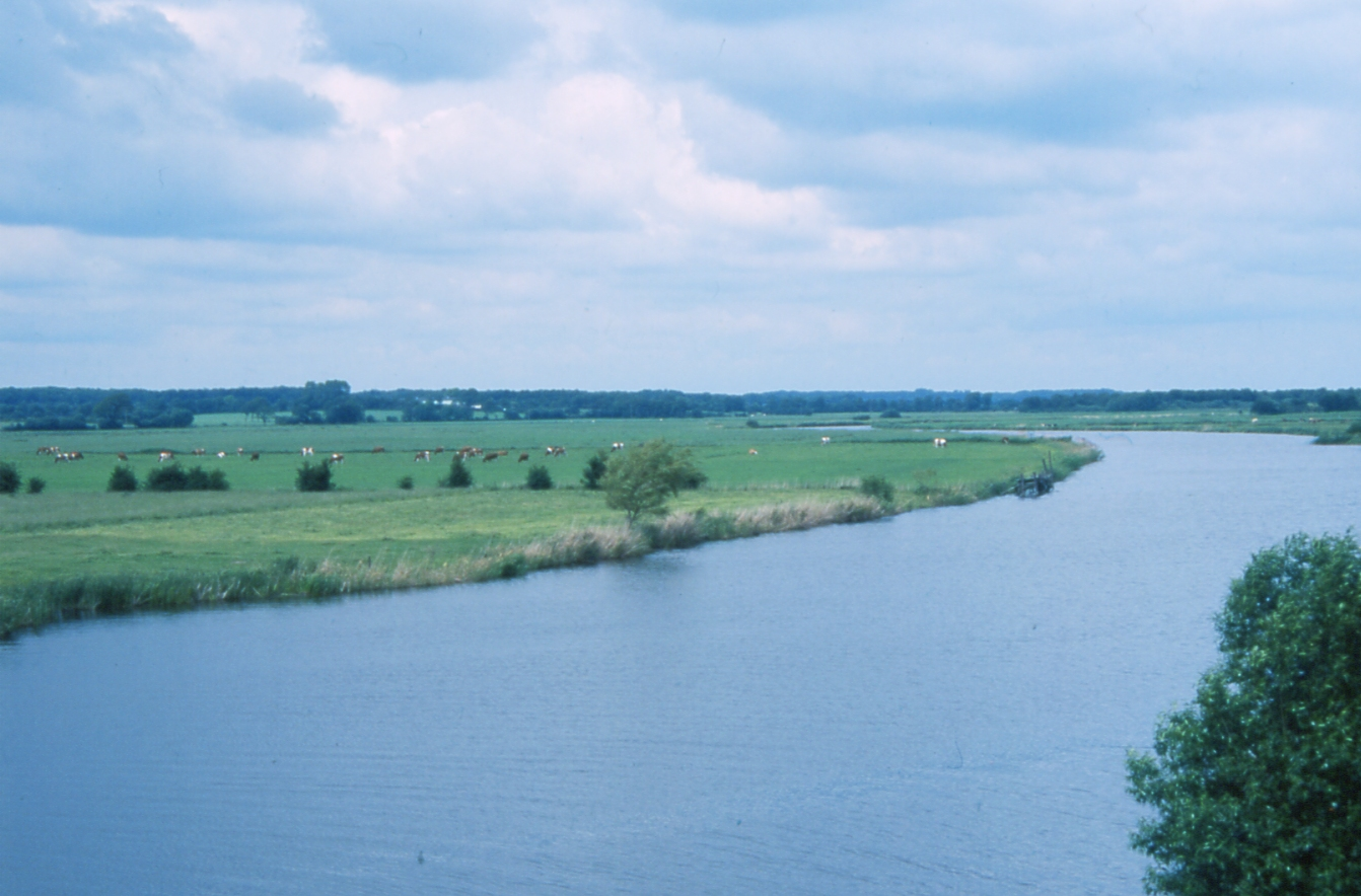 River Eider near the village of Breiholz in Schleswig-Holstein